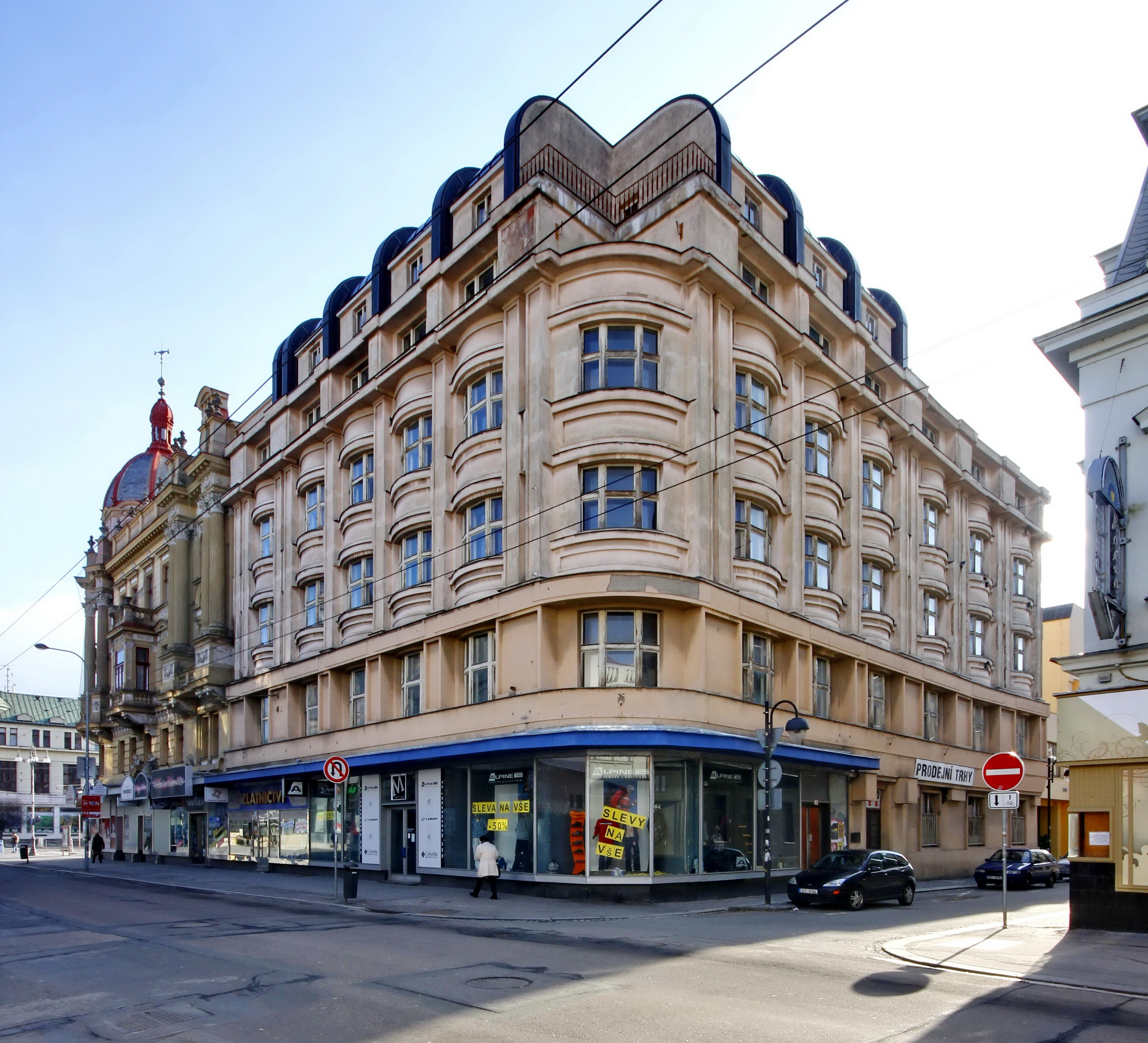 Oldřich Liska: Obchodní a činžovní dům "Na Kopečku", Pardubice, Zelené předměstí, Třída Míru č. p. 58